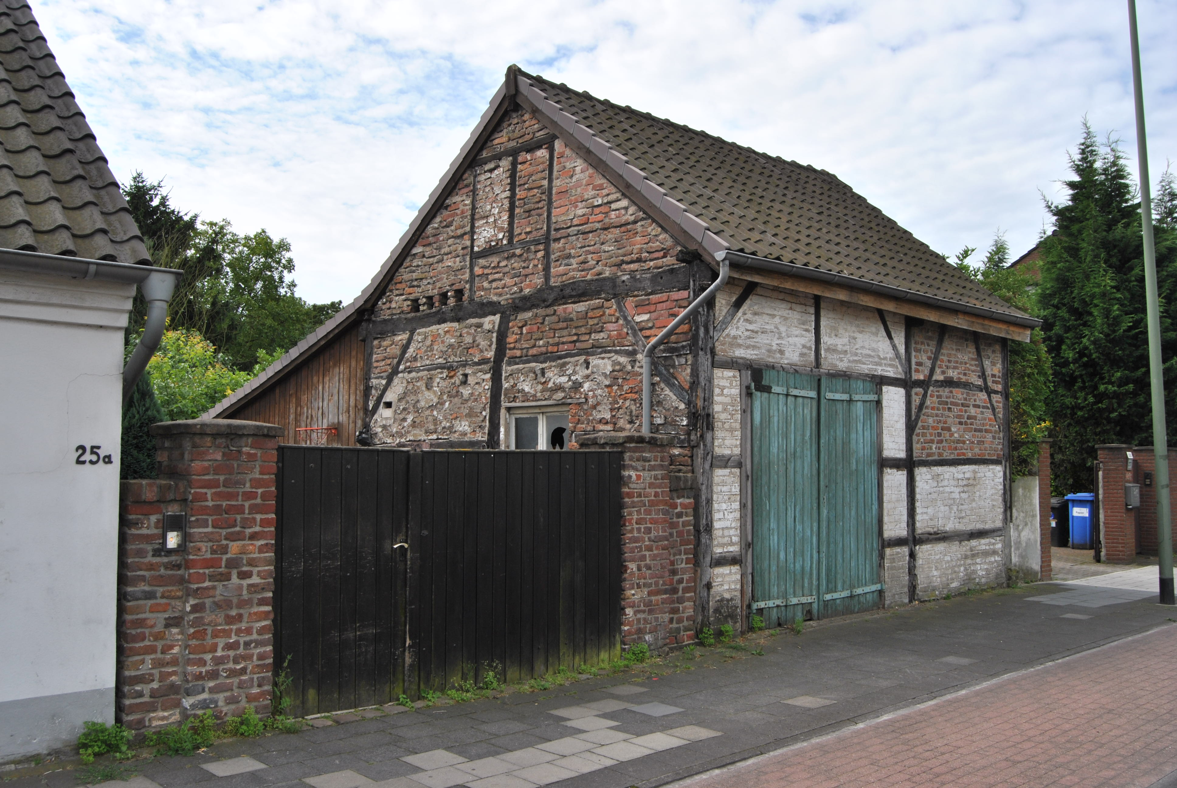 This photograph was taken with a Nikon D3000 This image shows a heritage building in Germany, located in the North Rhine-Westphalian city Duisburg. Freistehendes Wirtschaftsgebaeude, ein kleines Backsteinhaus in Fachwerkkonstruktion, gehoerend zum laendlichen Anwesen an der Dahlingstraße 25, typisch für Siedlungsstruktur des naheliegenden Denkmalbereichs Dorf Friemersheim - Denkmalliste Duisburg, Nr. 371 - Objektkoordinaten: 51.22'58.09"N, 6.42'10.06"E